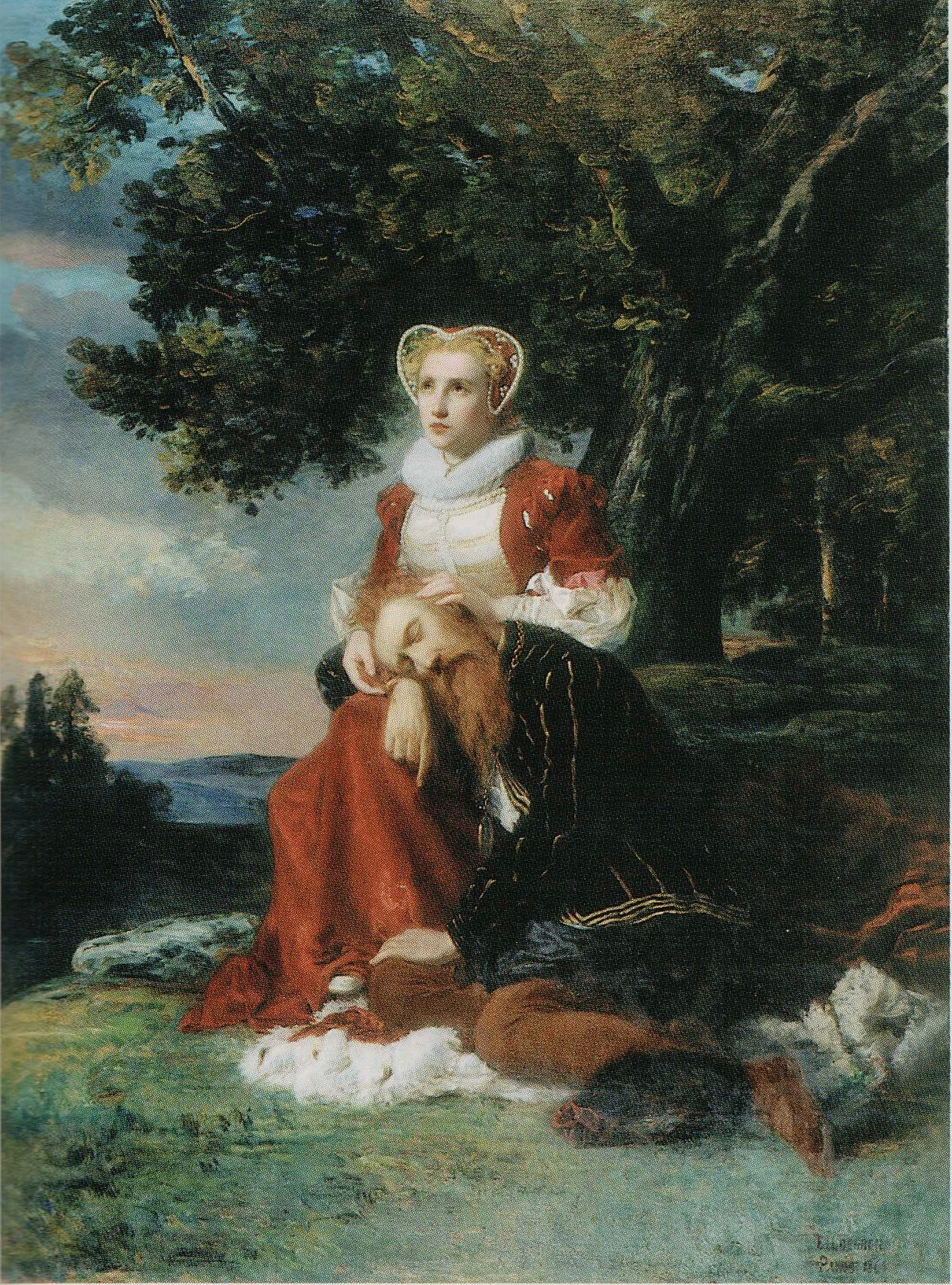 Karin Månsdotter